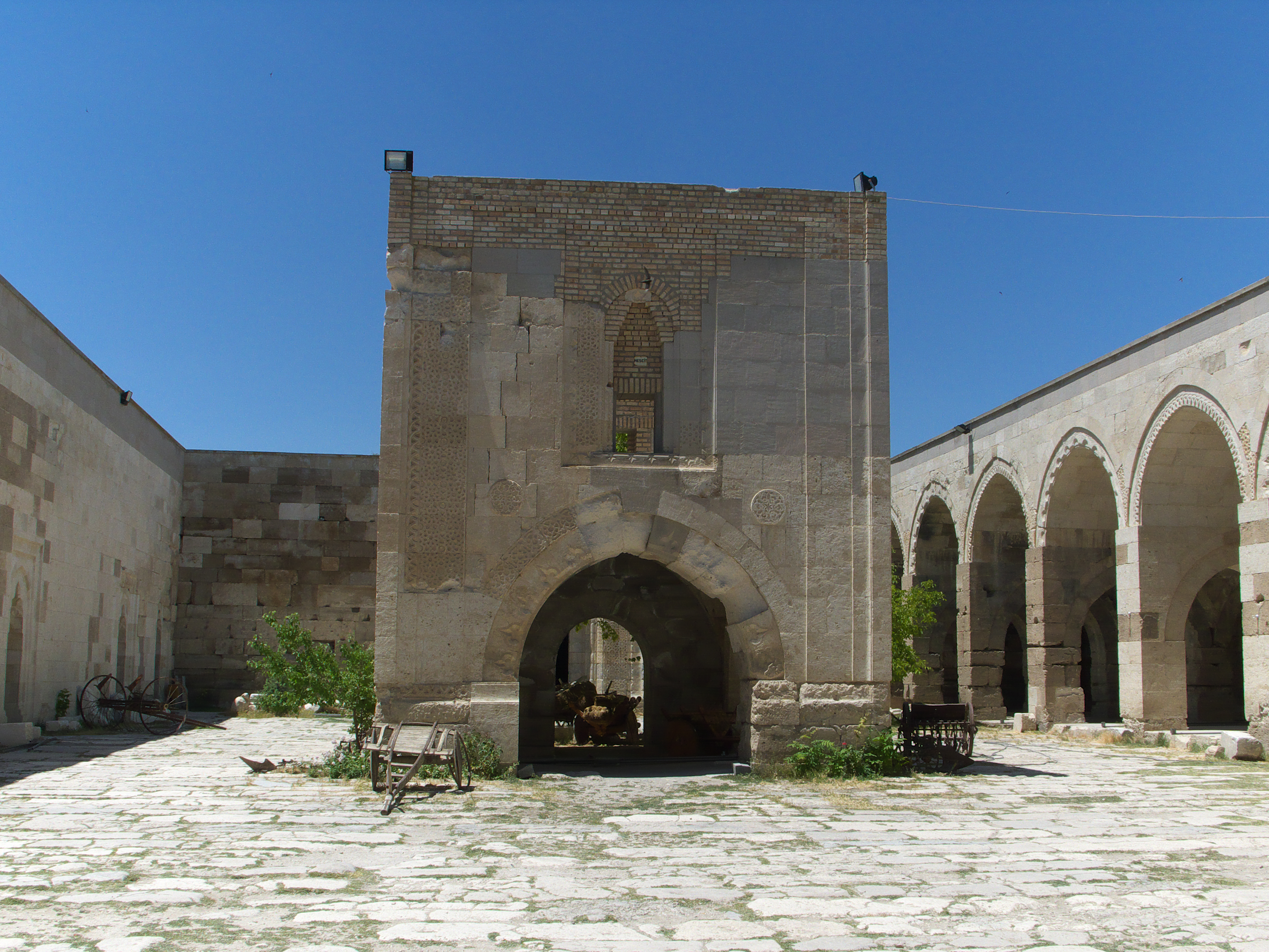 La Ruta de la Seda requería albergues para las caravanas de comerciantes, seguros y gratis durante tres días. El Sultanjan de Aksaray (1228-1229) es obra del arquitecto Amele Mohamed, siendo sultán selyúcida Alá al-Din Kaikubad I.